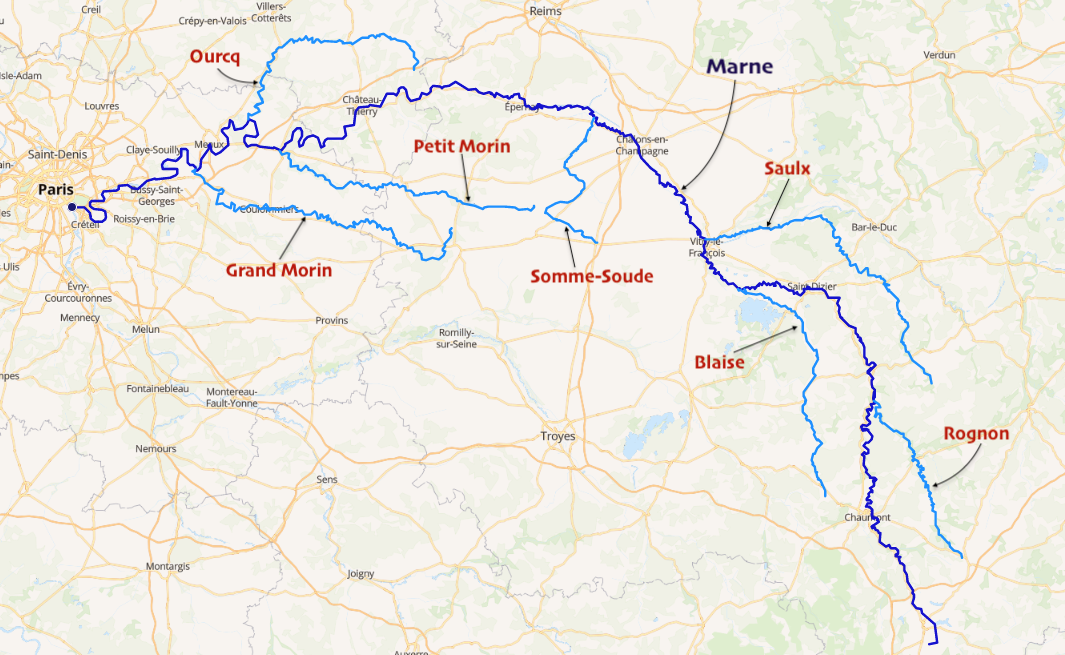 carte réalisée sur umap This map may be incomplete, and may contain errors. Don't rely solely on it for navigation.